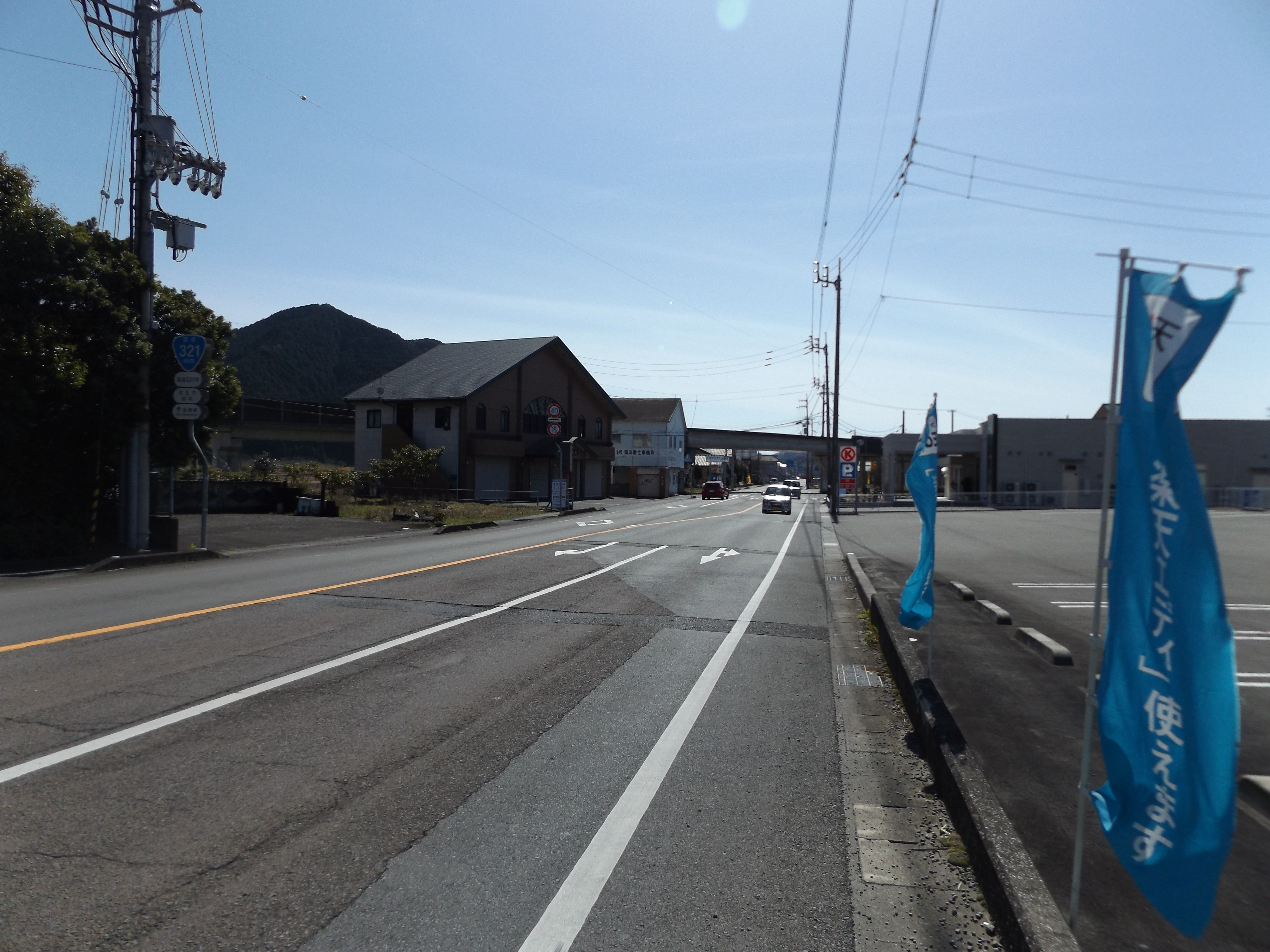 高知県宿毛市を通る国道321号。撮影地点より手前にある交差点が終点。